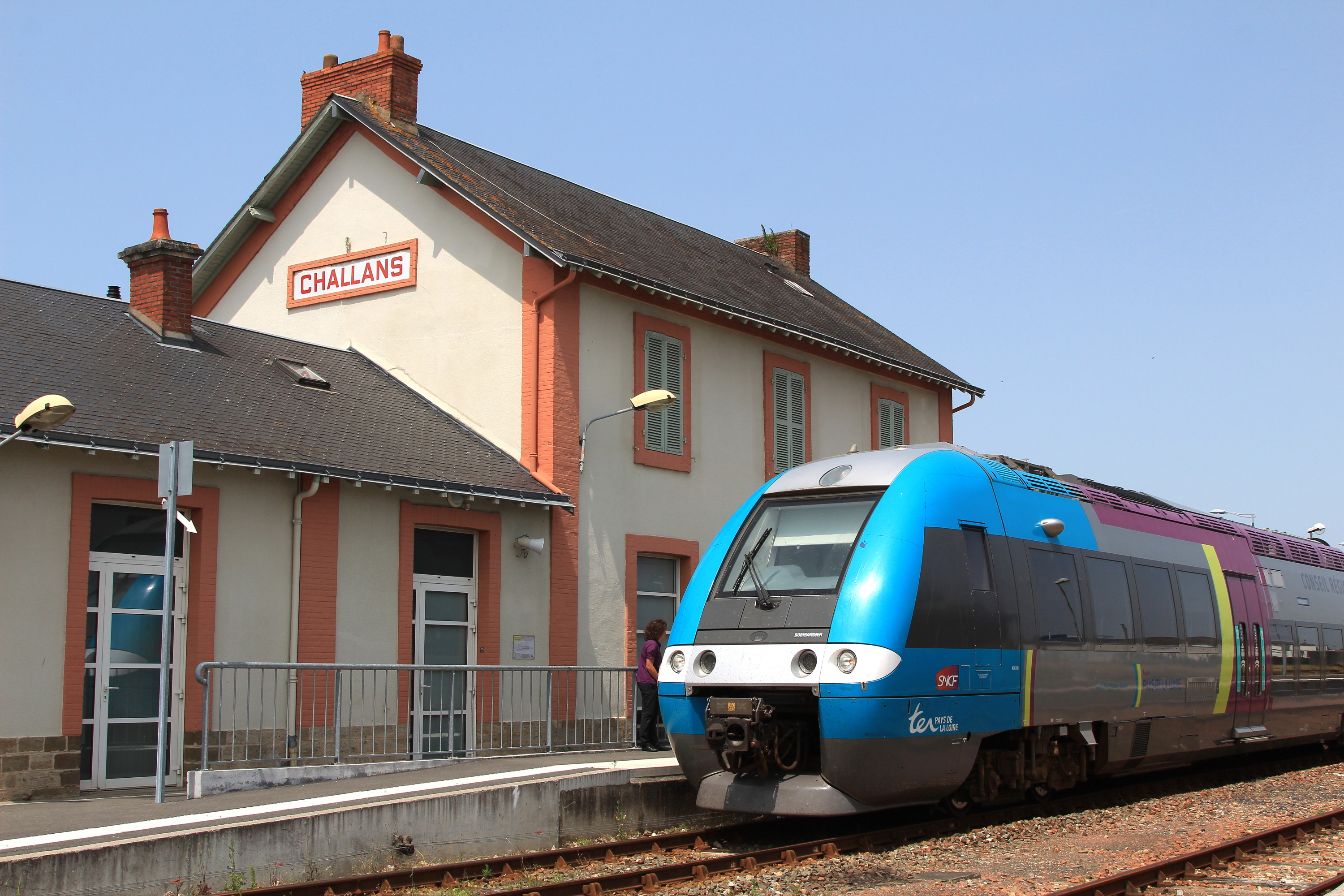 Un TER assuré par un X 76500 (XGC) et se dirigeant vers Saint-Gilles-Croix-de-Vie en gare de Challans.